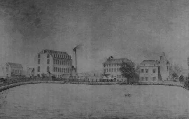 Ellermühle vor 1900